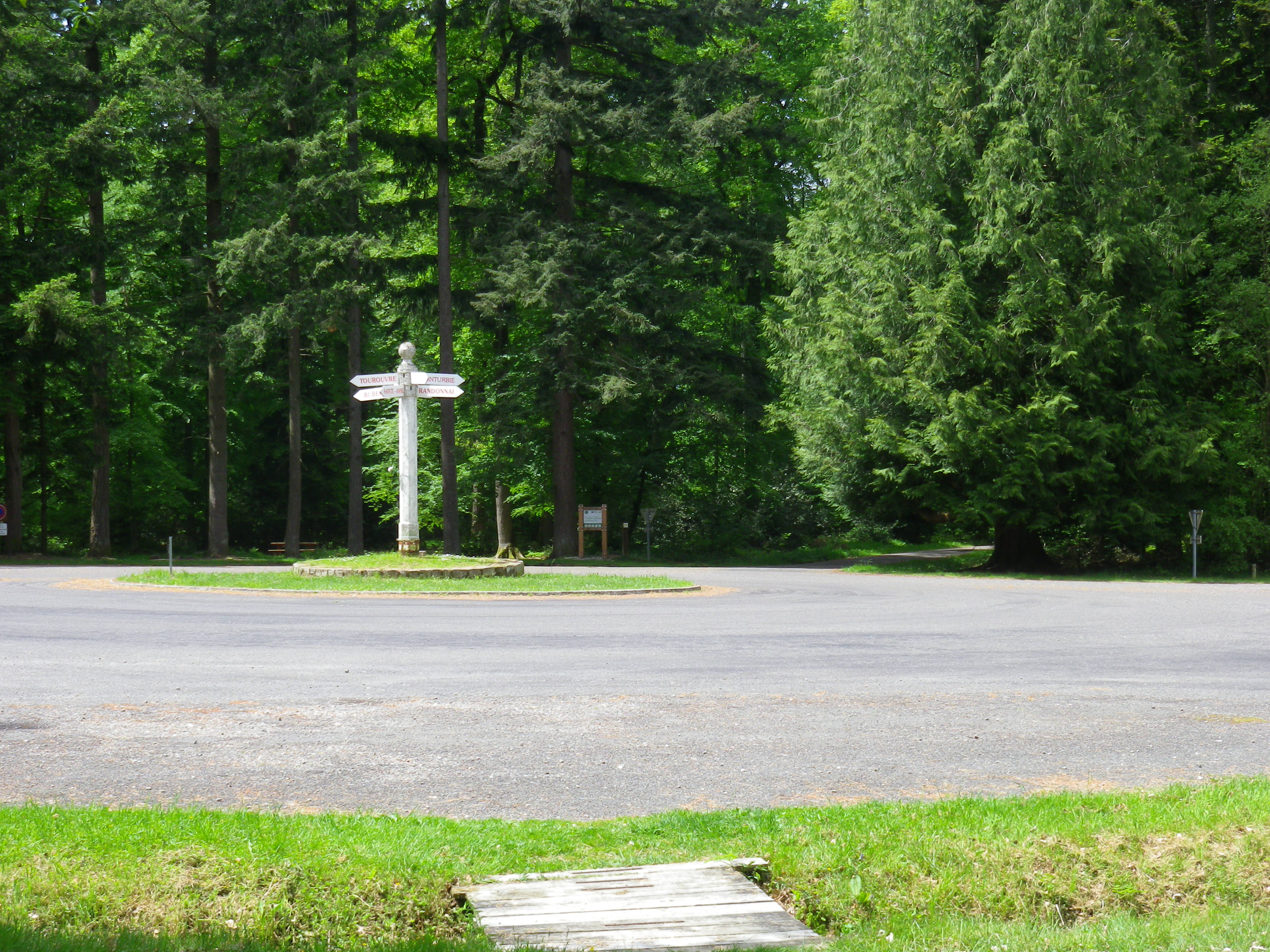 Carrefour de l'étoile du perche, foret domaniale perche-trappe, parc naturel régional du Perche